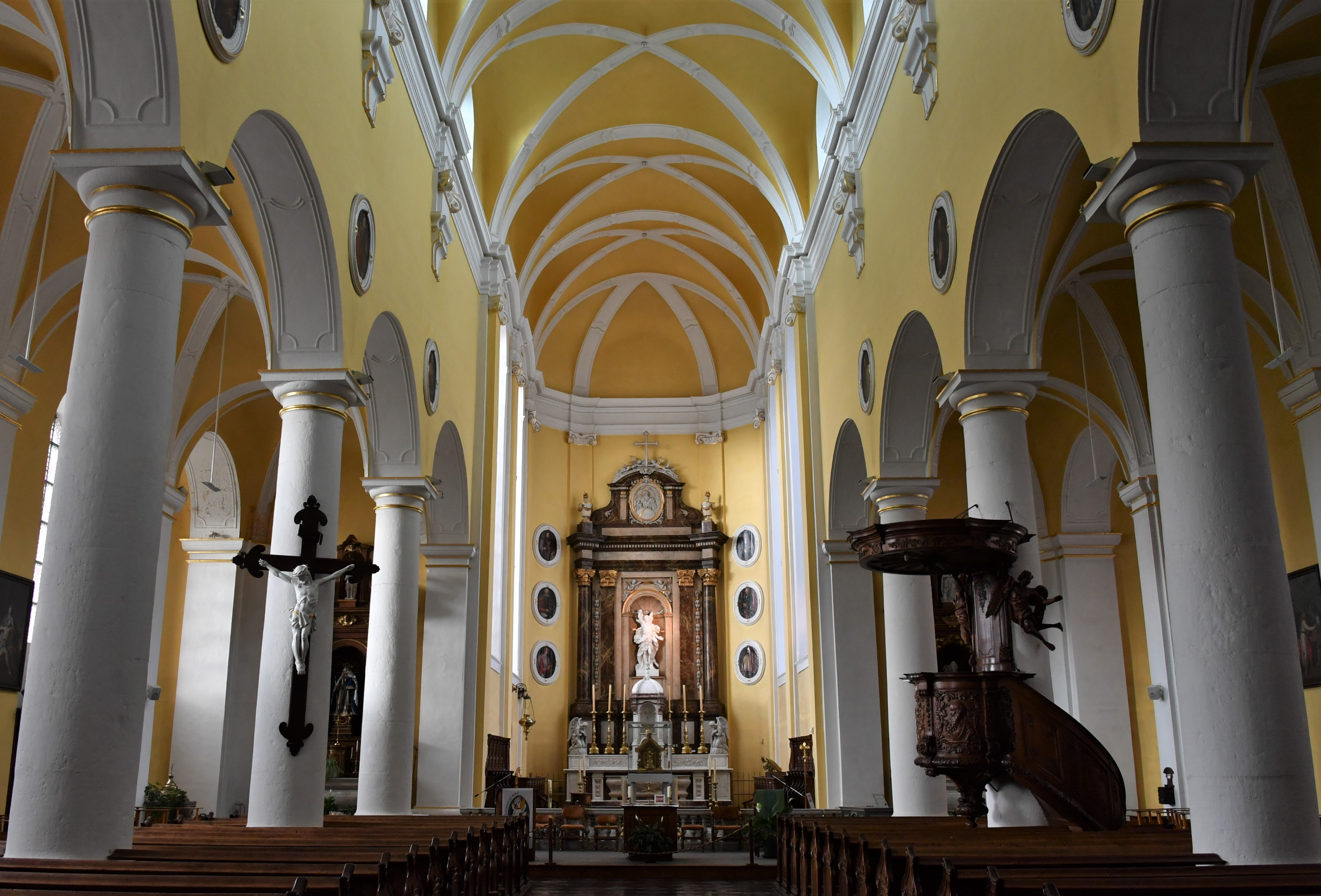 Saint Sébastien mit dem Remaklus-Schrein, Stavelot